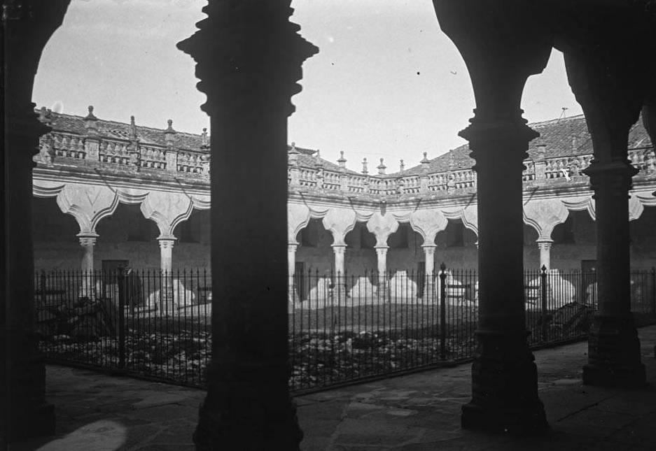 Imatge